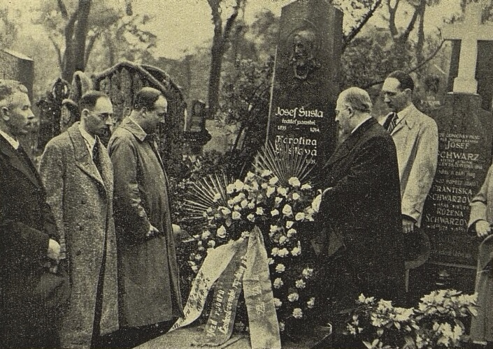 Vzdání holdu J. Šustovi čsl. rybáři, 1938